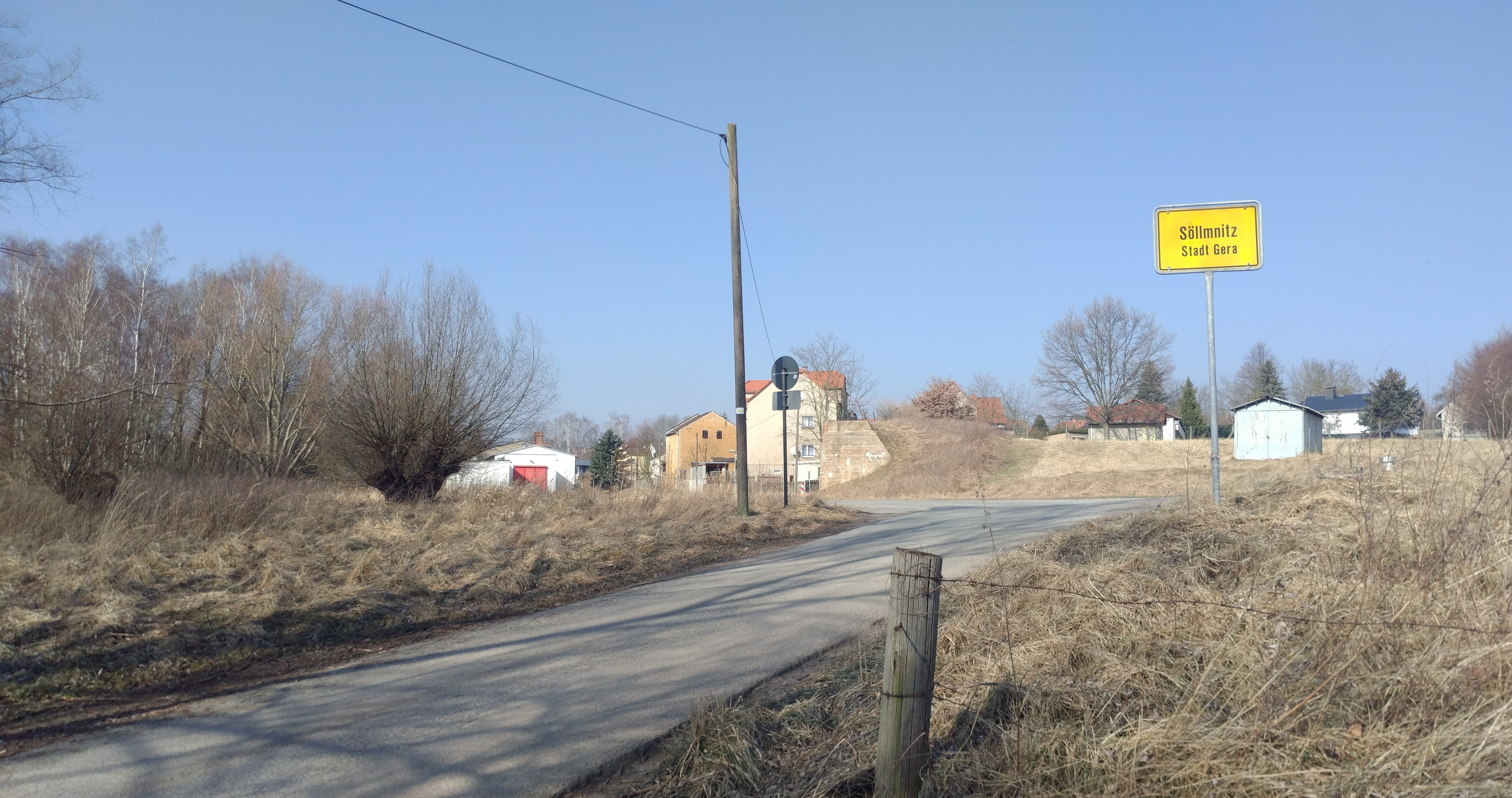 Rechts die Verladestelle, links das umgebaute Bahnhofsgebäude.